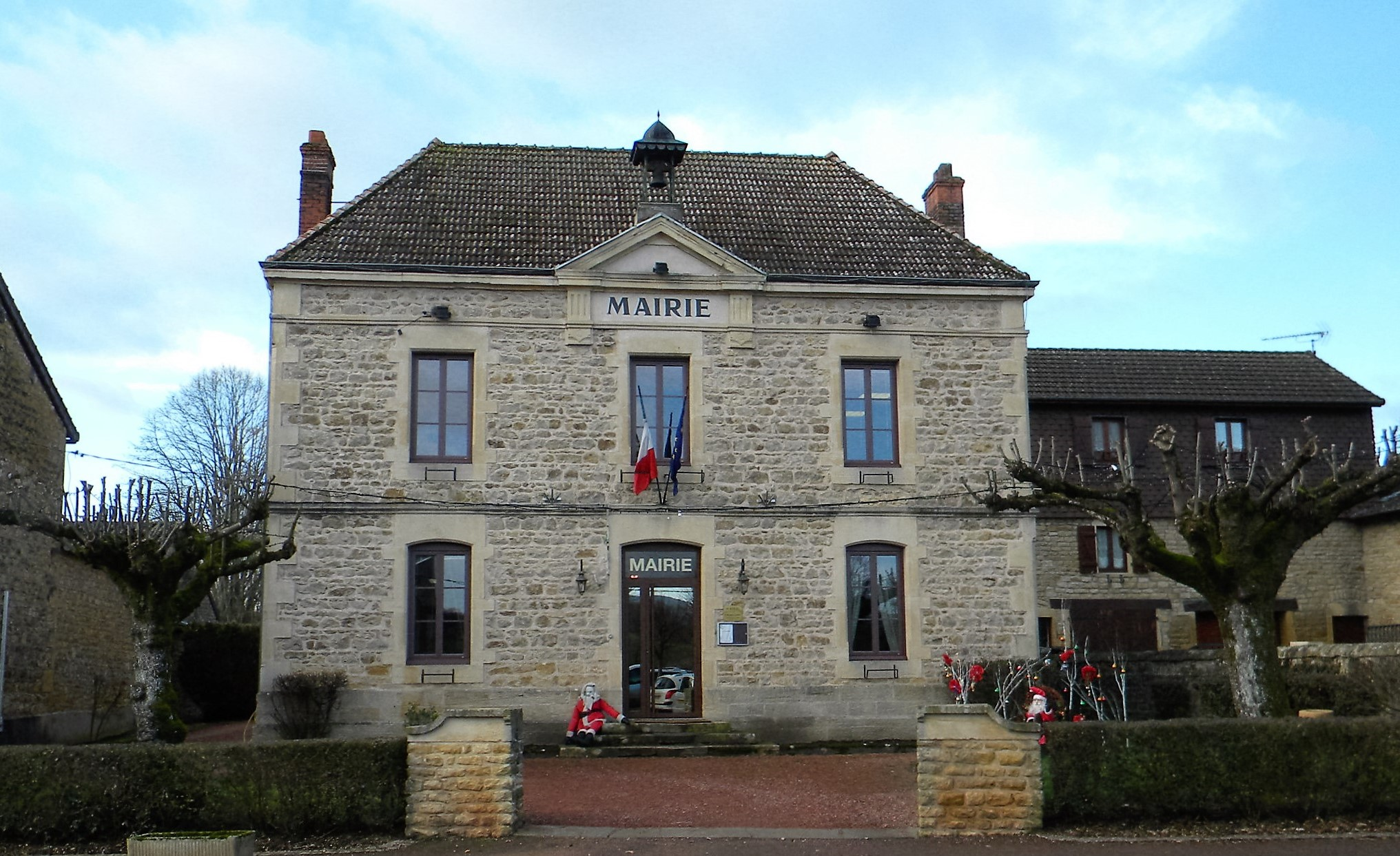 Mairie de Saint-Maurice, façade vue de la route